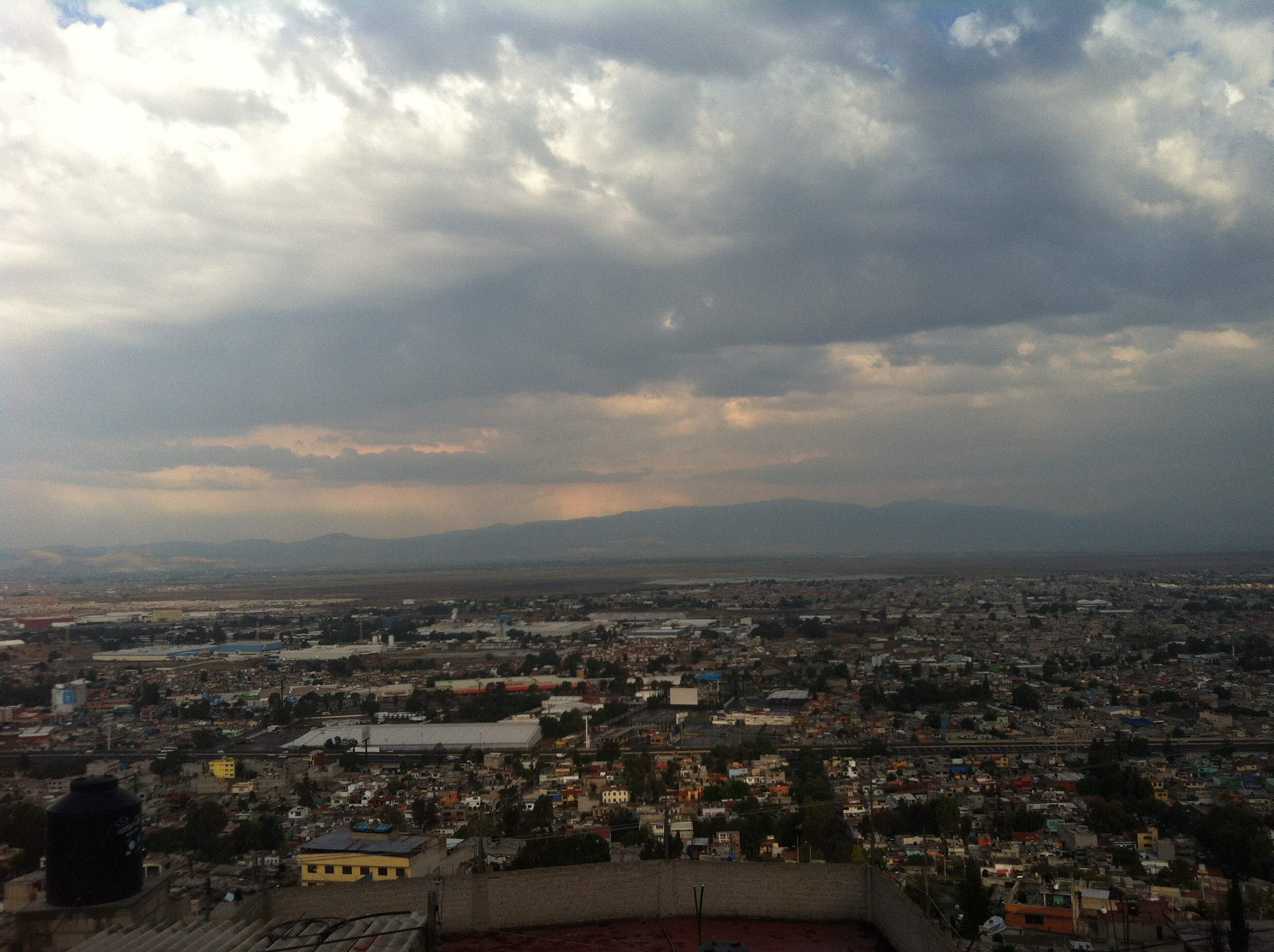 La autopista México Pachuca, La Sosa Texcoco y la creciente mancha urbana vista desde Lomas de San Carlos.